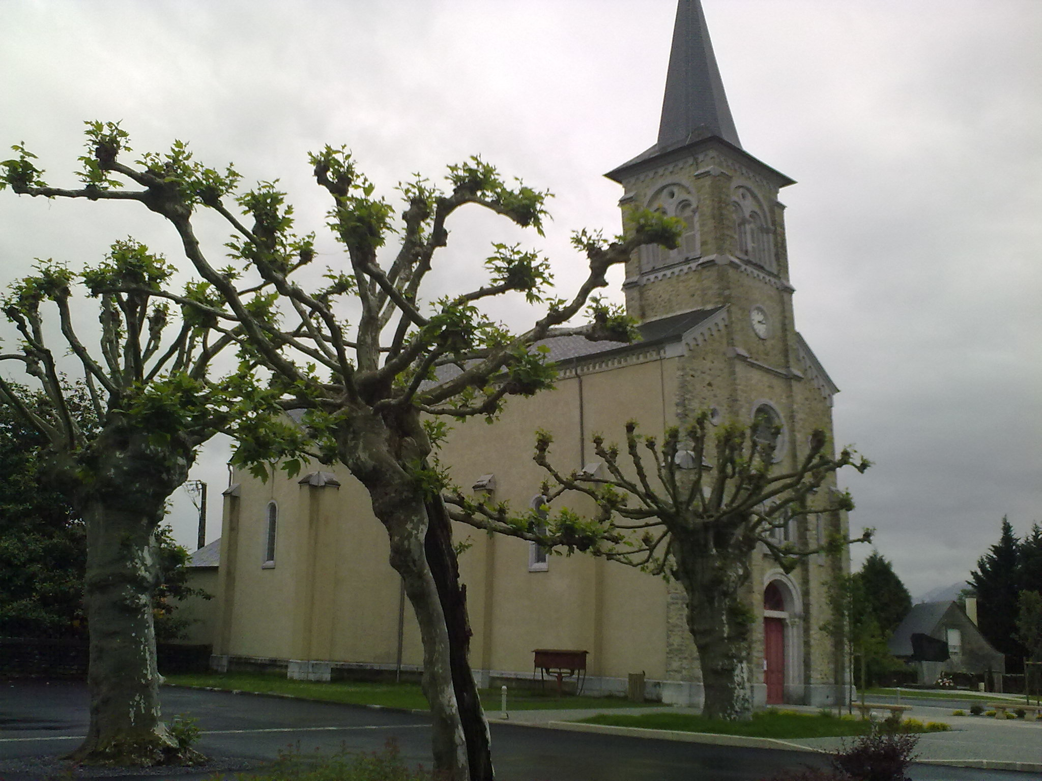 Gurmençon, France